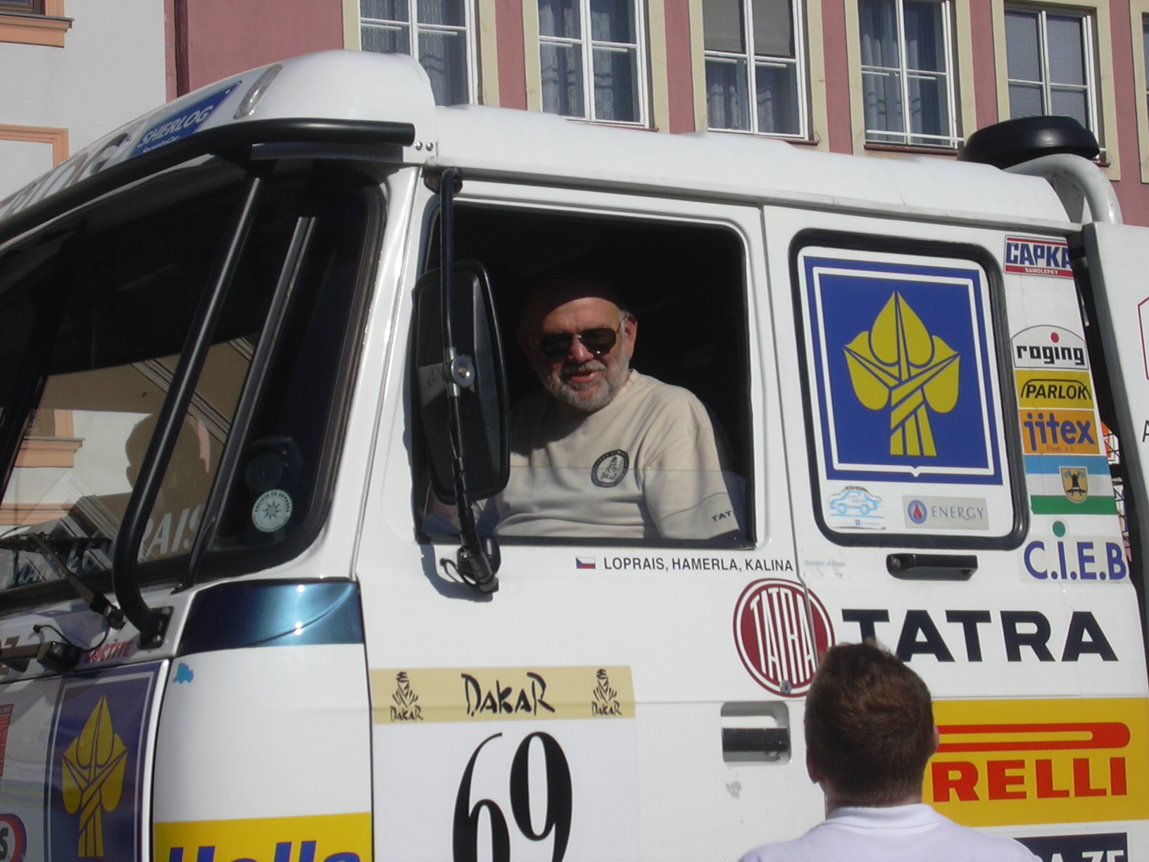 Karel Loprais ve Vyškově